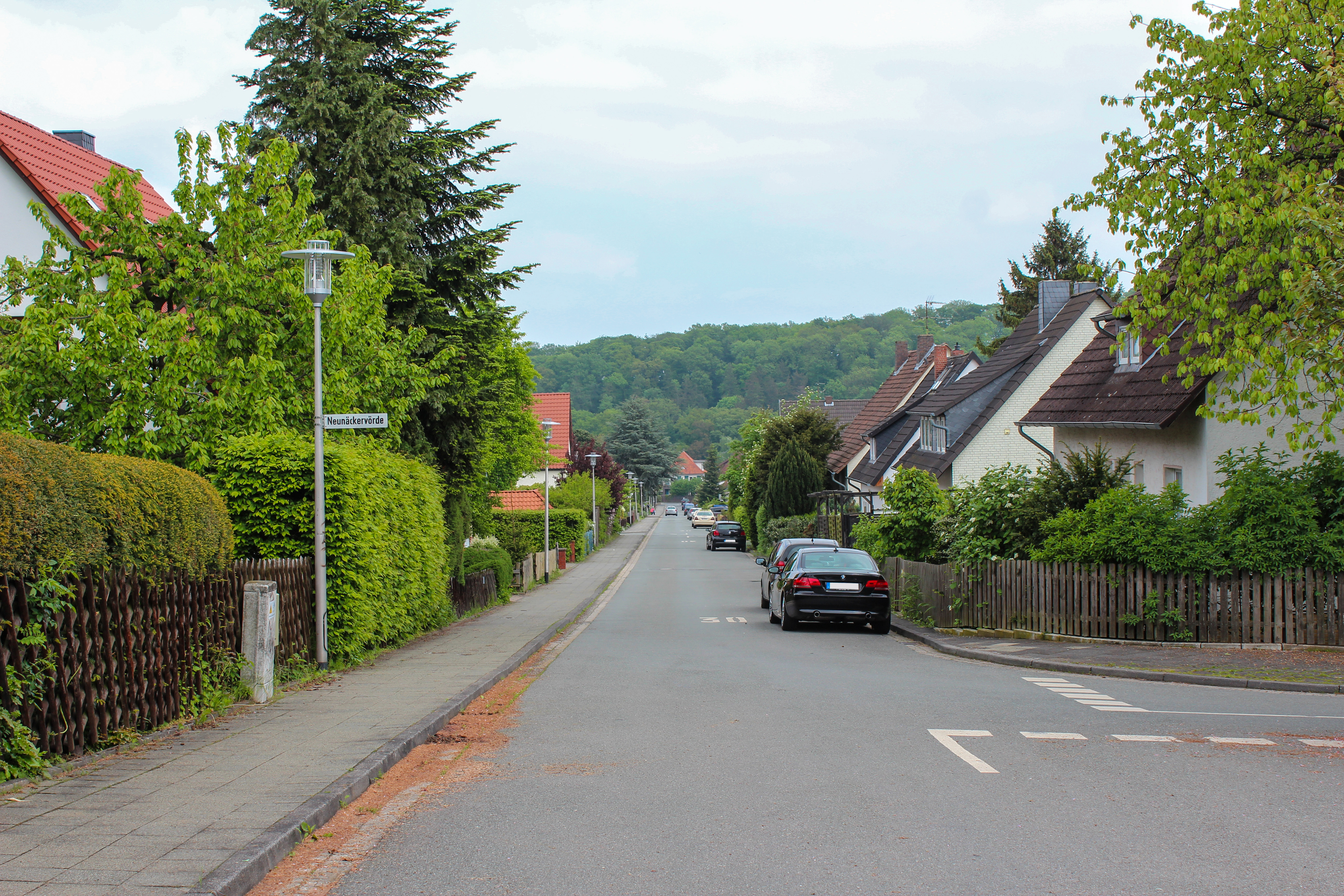 Der Birnbaumskamp am 19. Mai 2013. Fotografiert vom Wendeplatz.